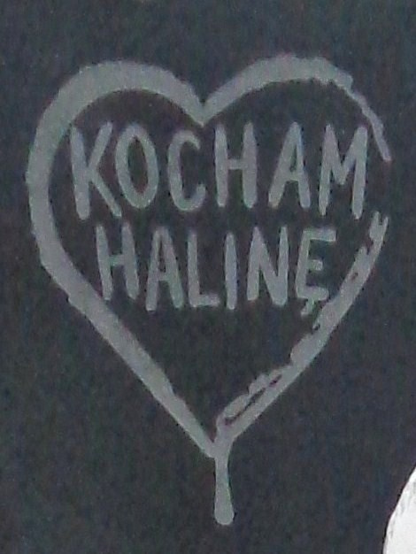 Fragment nagrobka Haliny Chmielewskiej na Cmentarzu Wojskowym na Powązkach.